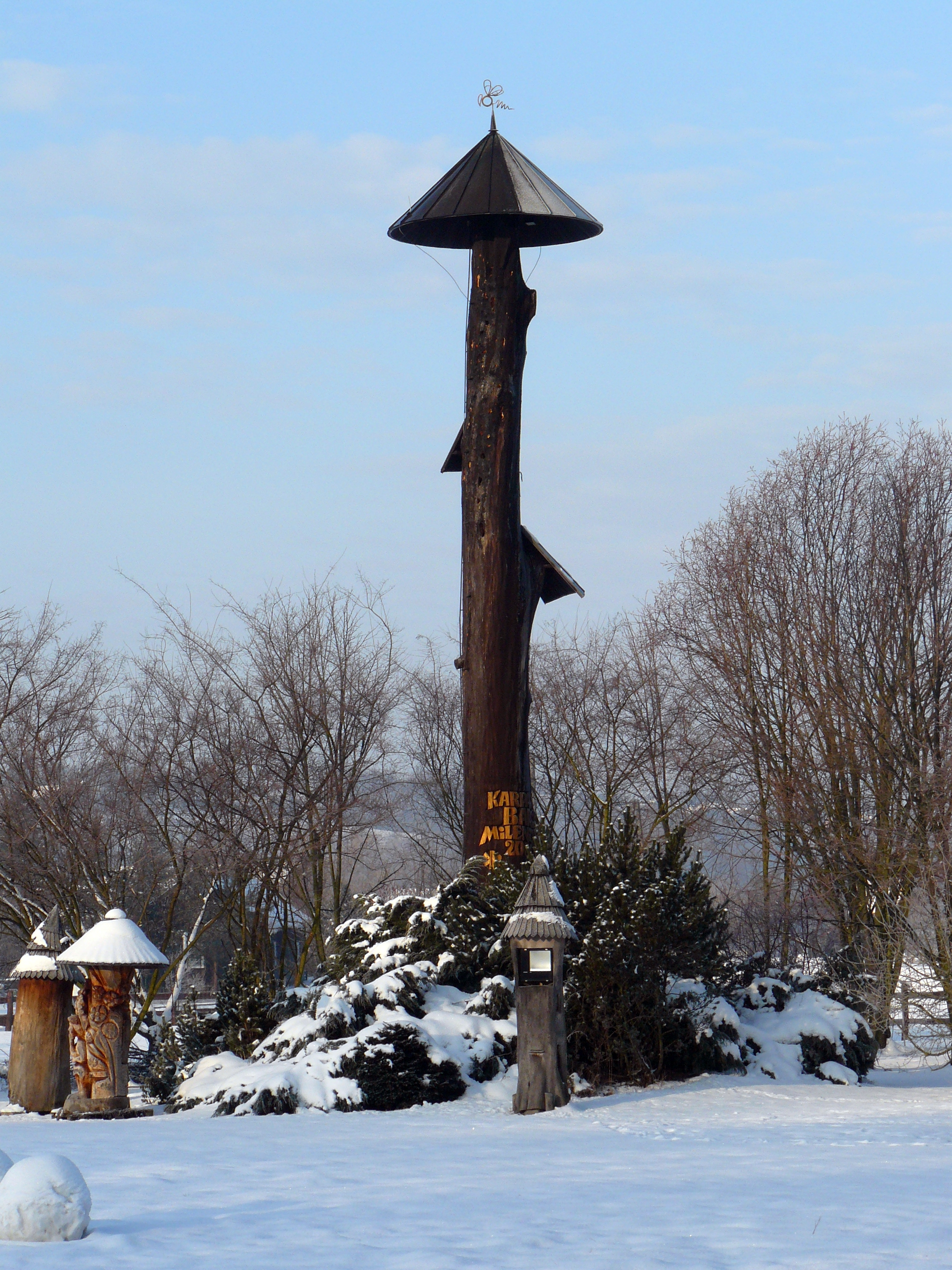 Karpacka Barć Milenijna w Stróżach, barć o wysokości 15,31m znajduje się na terenie muzeum "Sądeckiego Bartnika". Najwyższy tego typu obiekt w Polsce.